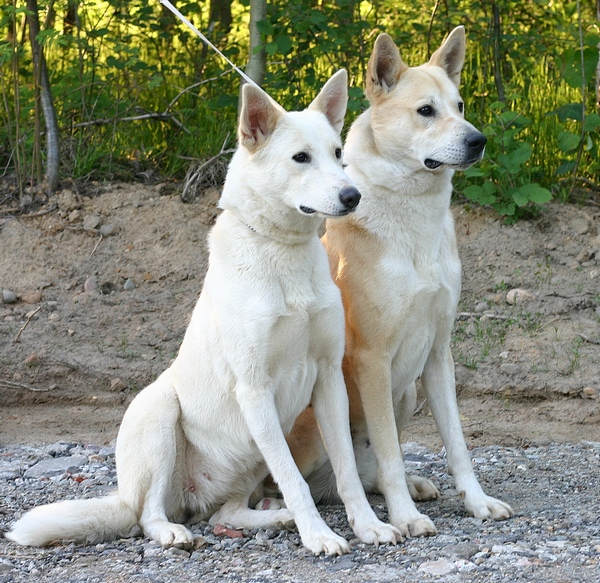 Canaan Dog